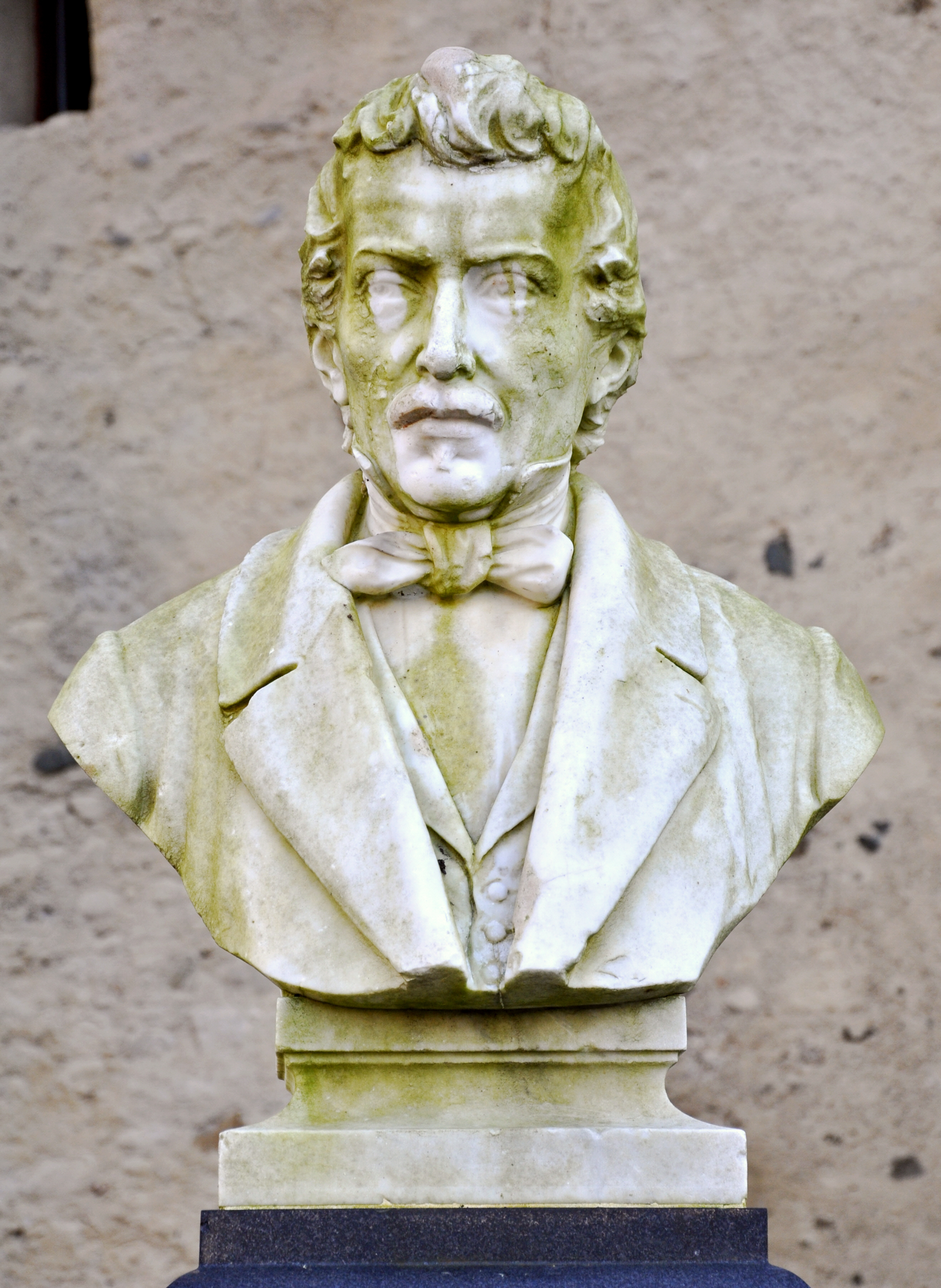 Wangen im Allgäu, Büste des Malers Joseph Anton von Gegenbaur, von August Schädler, 1901